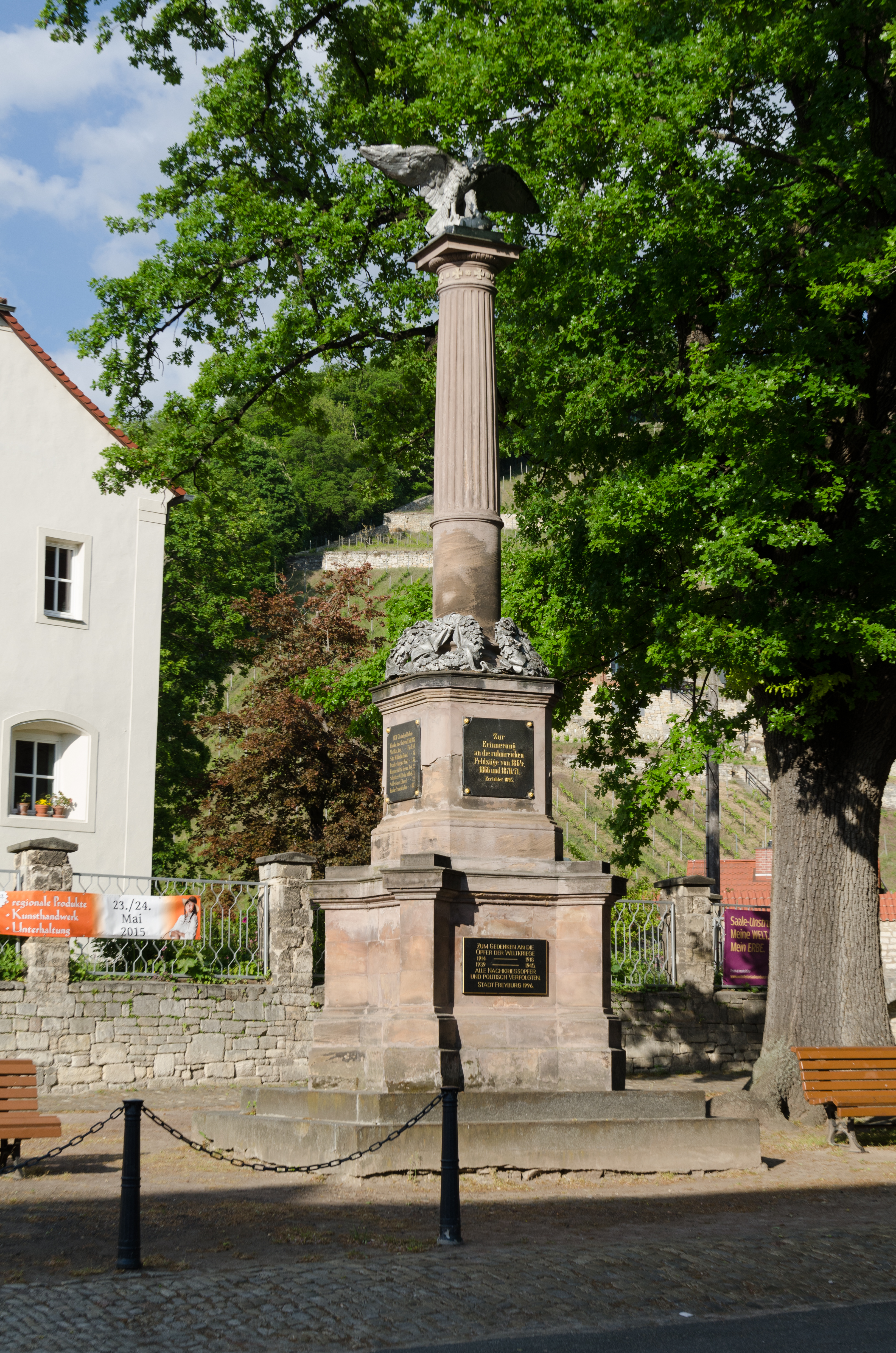 Freyburg an der Unstrut, Kirchplatz, Kriegerdenkmal